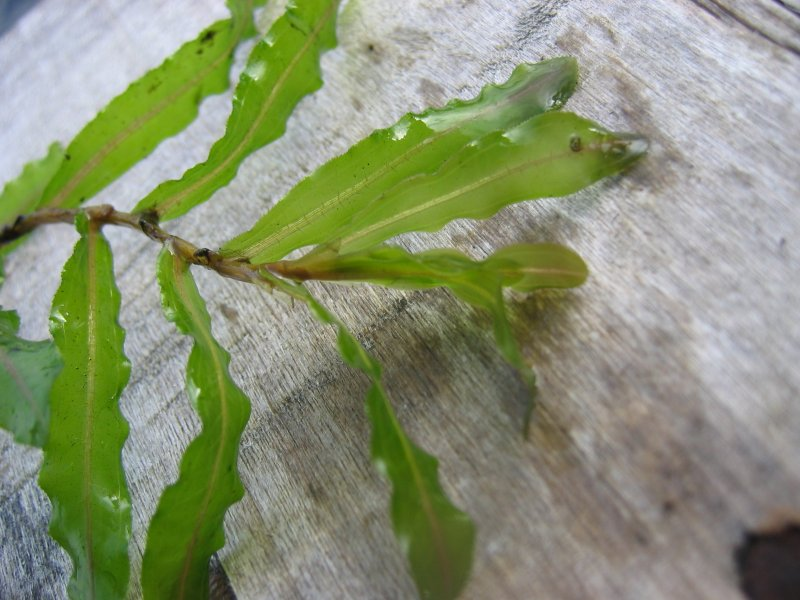 Krauses Laichkraut Potamogeton crispus